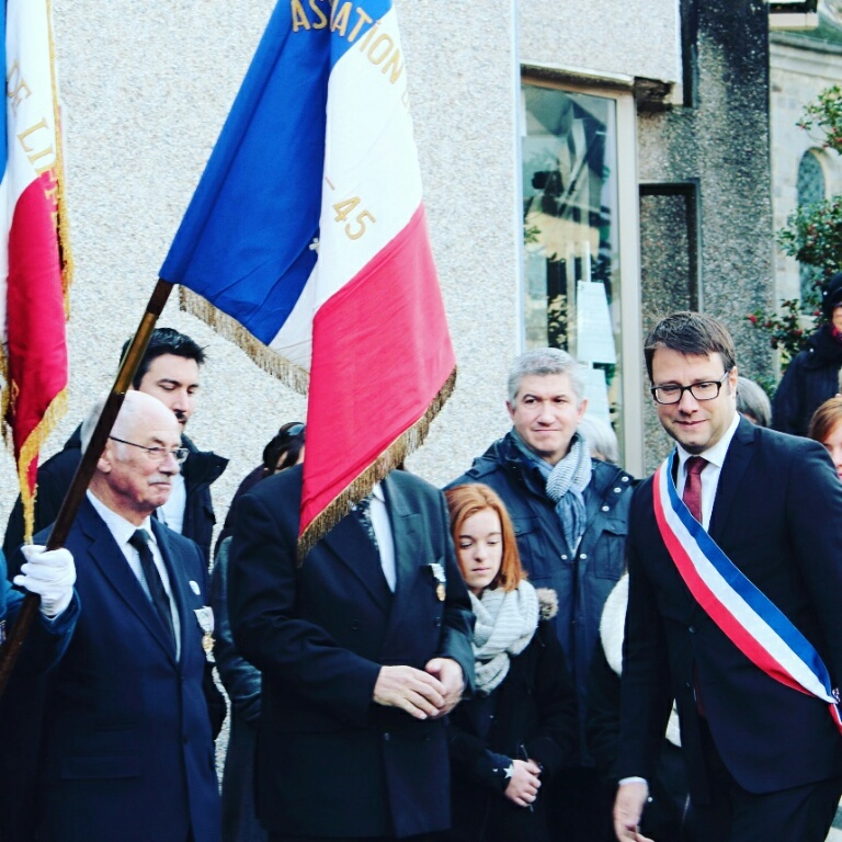 Cérémonie armistice Liffré